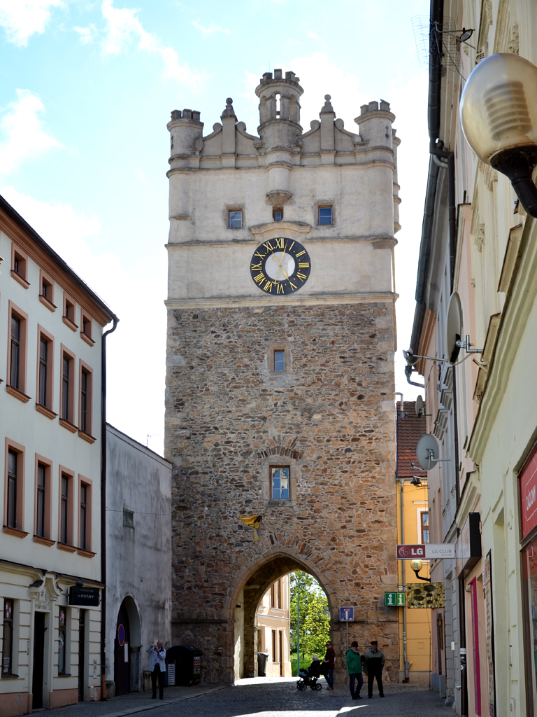 Brána Matky Boží, Jihlava